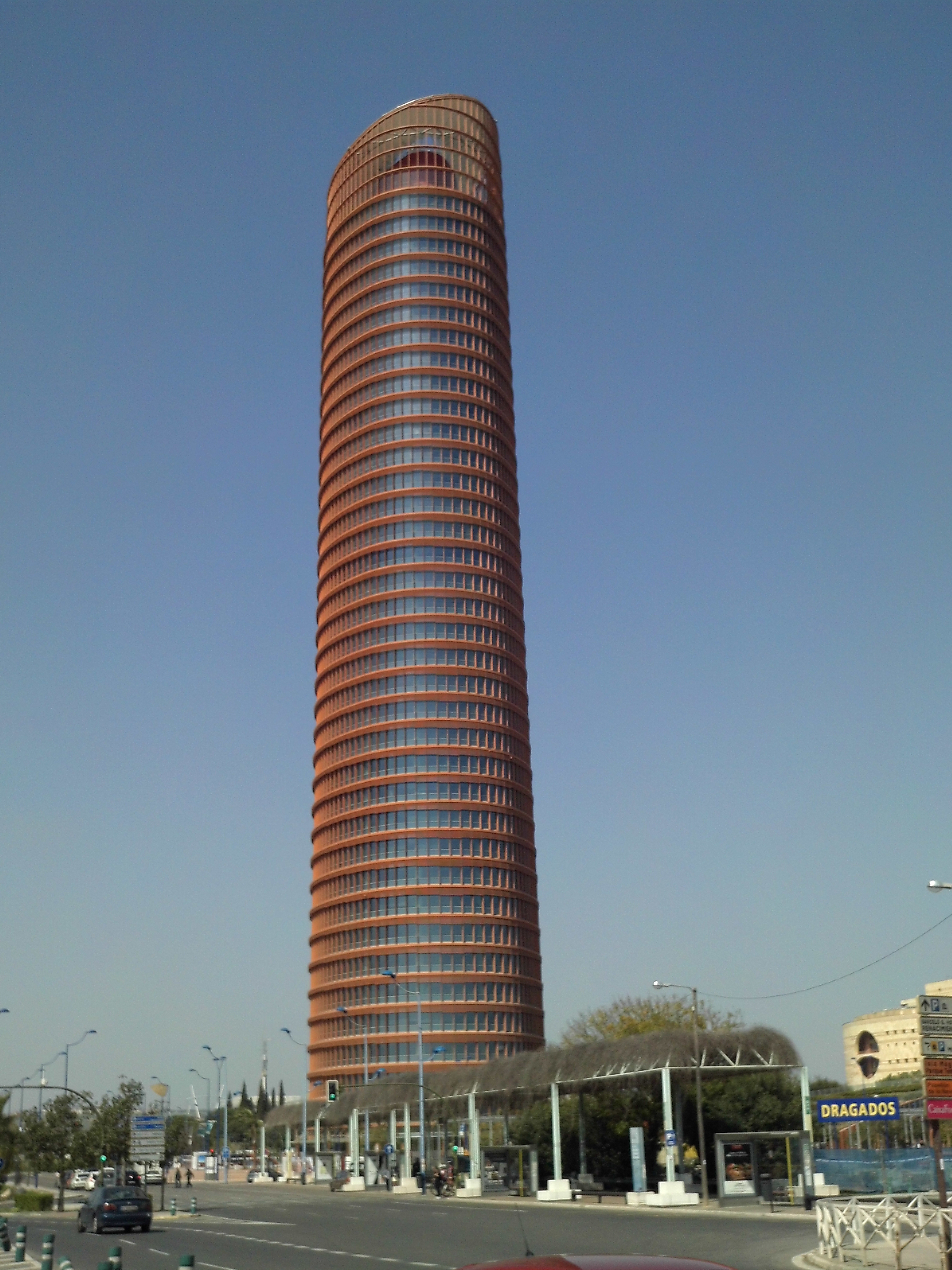 Torre Sevilla. Sevilla, Andalucía, España.